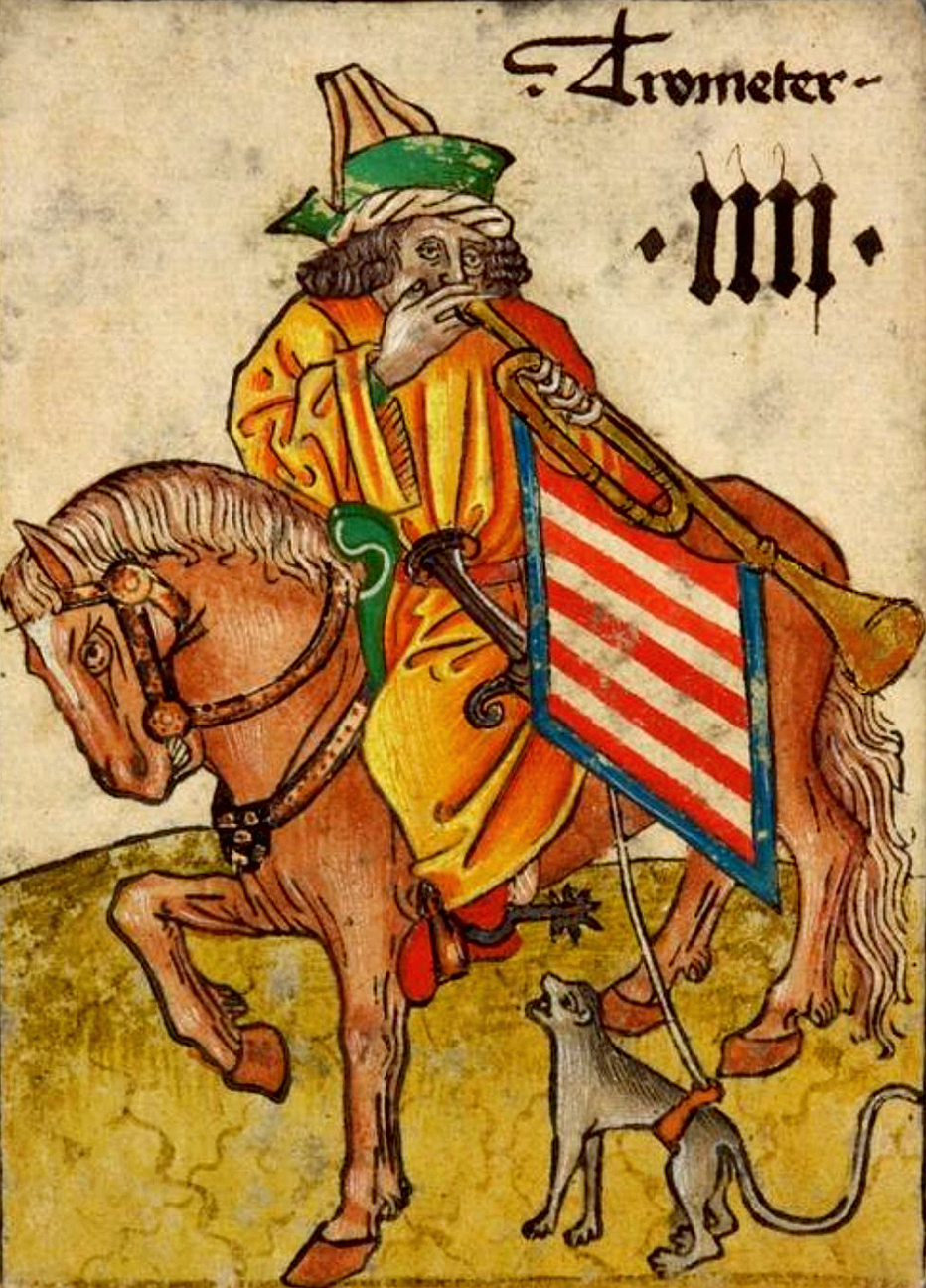 Jeu de cartes Hofämterspiel (Hongrie, III : le trompettiste)